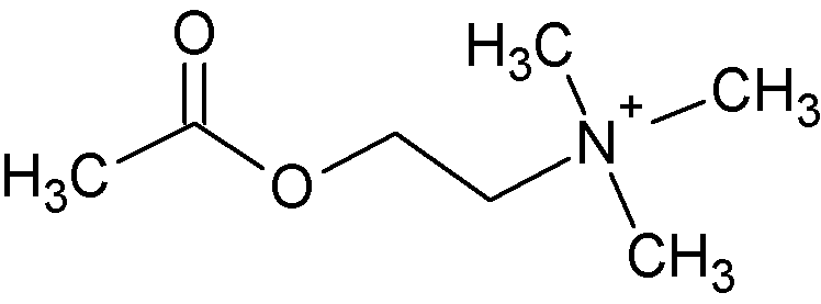 Acetylcholín.